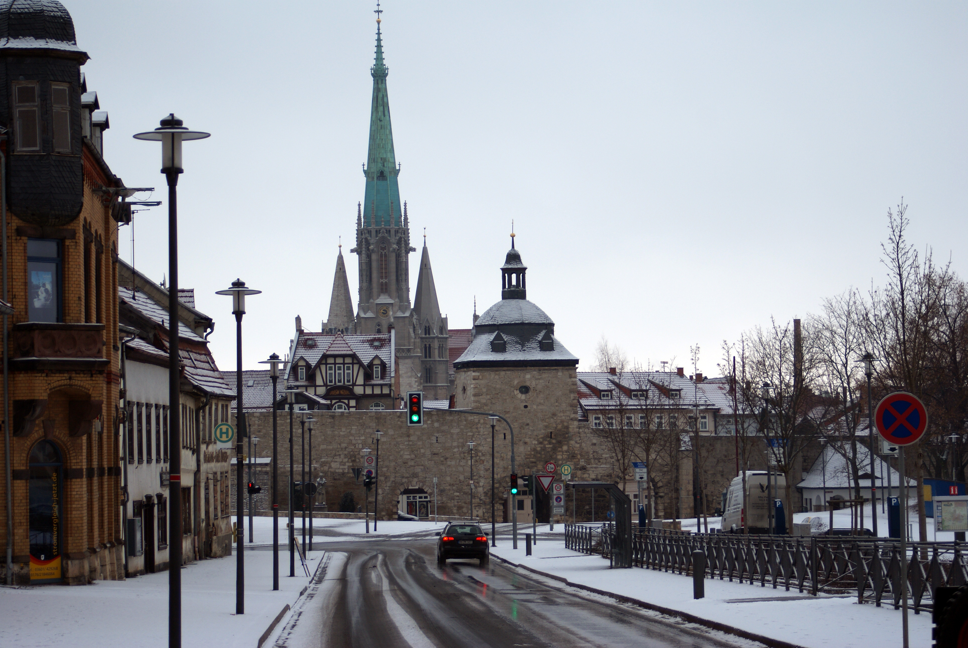 Das Frauentor mit Marienkirche